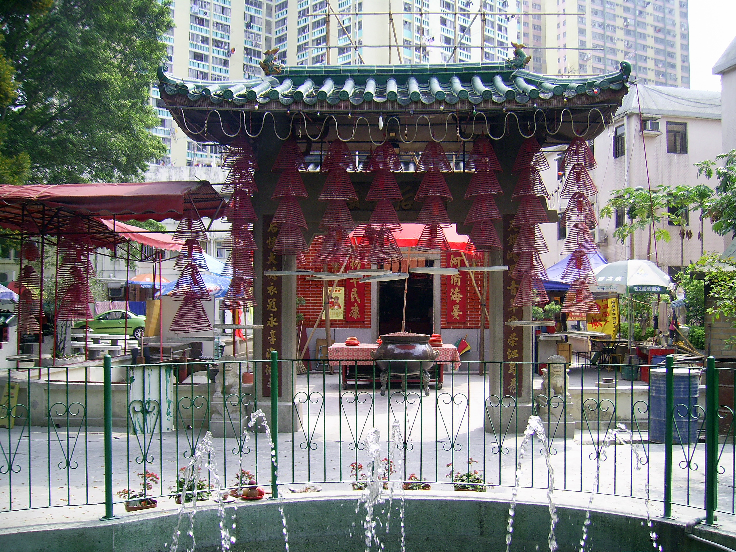 中文（香港）: 青衣天后古廟